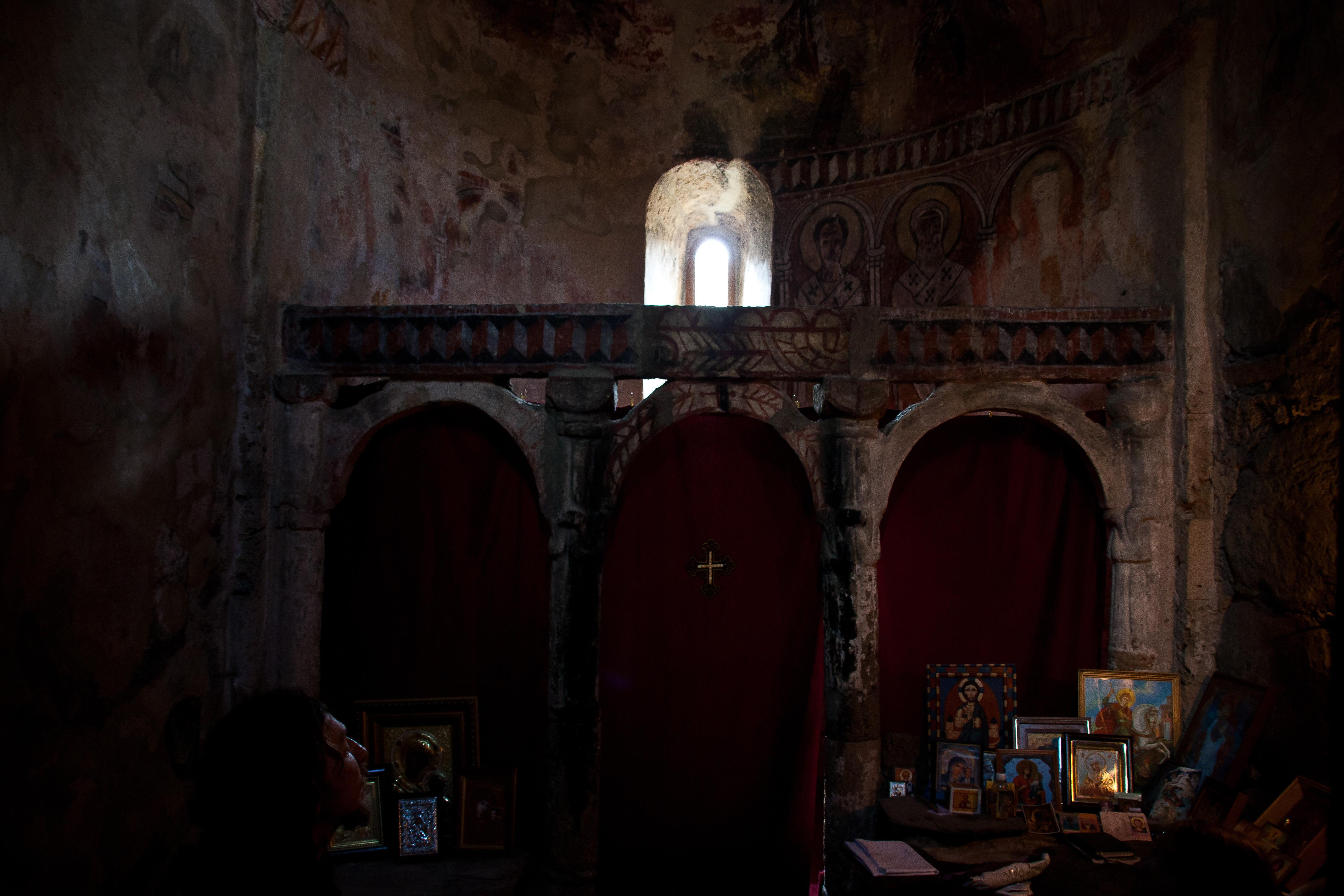 ღვთისმშობლის ეკლესია „ლამარია“